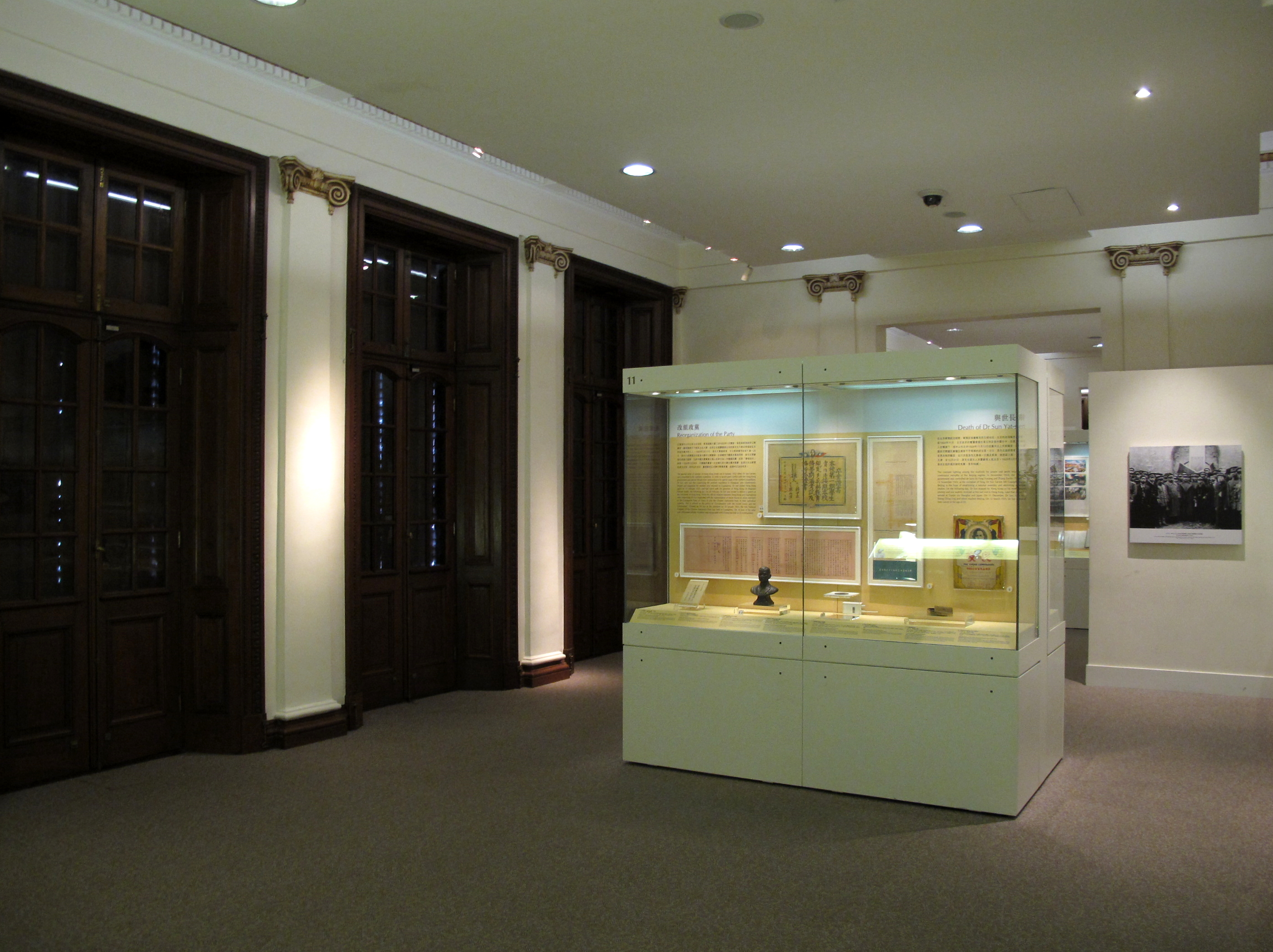 Dr. Sun Yat-sen Museum Exhibit